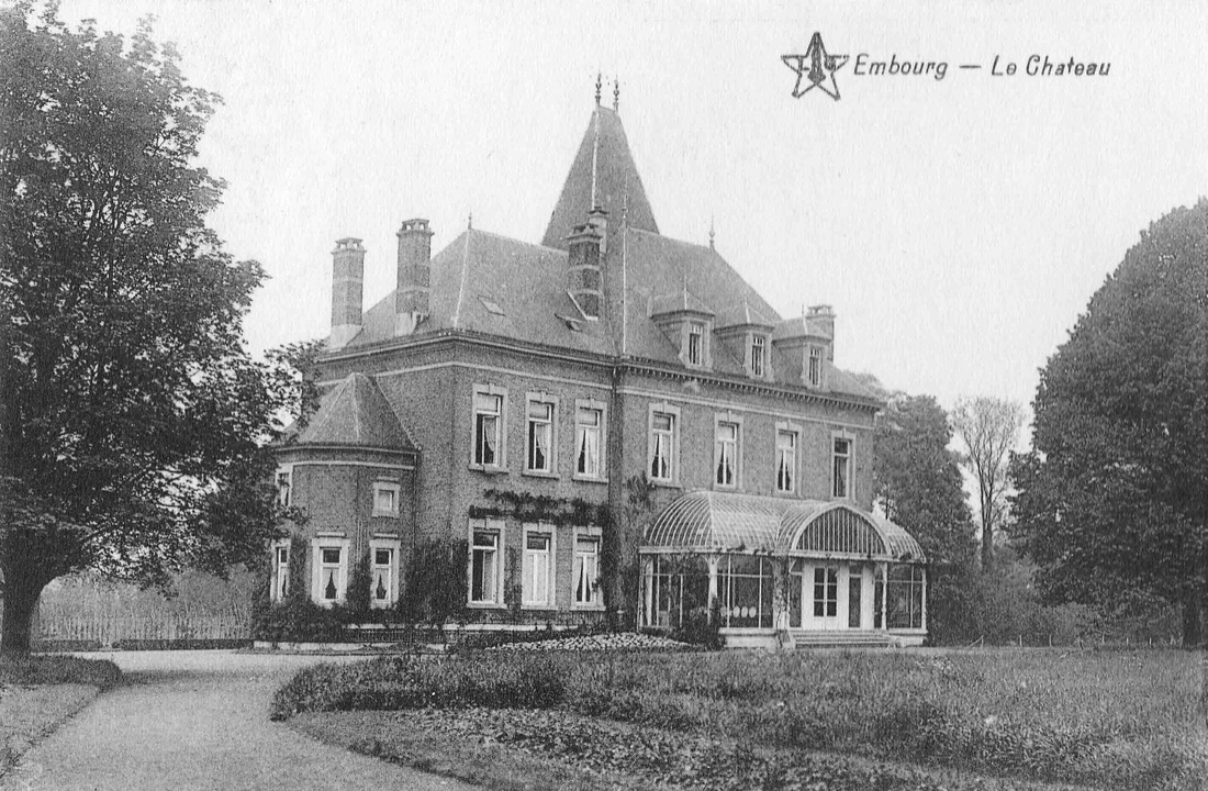 Château d'Embourg construit en 1878 par Adrien Dawans afin d'y résider.